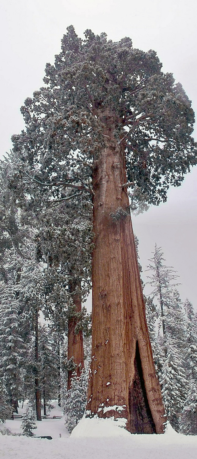 General Grant Tree: Riesenmammutbaum (Sequoiadendron giganteum), Sequoia-&-Kings-Canyon-Nationalparks